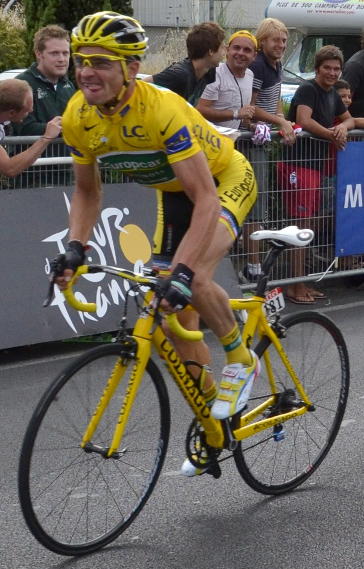 Thomas Voeckler portant le maillot jaune lors de la 15e étape du Tour de France 2011.